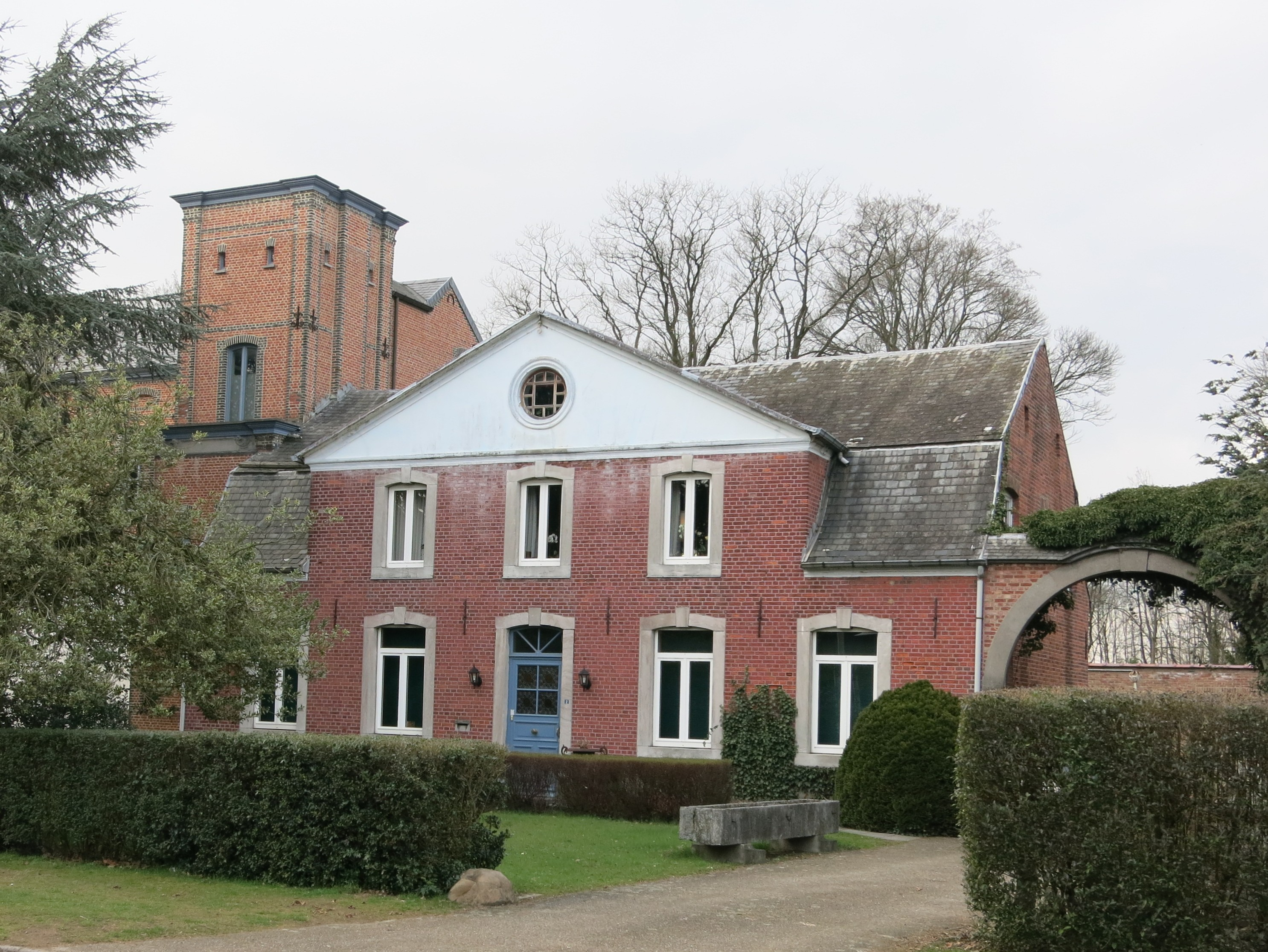 Herenhuis in Koersel (Beringen) met een deel uit de 18de eeuw en deel eind 19de-eeuws